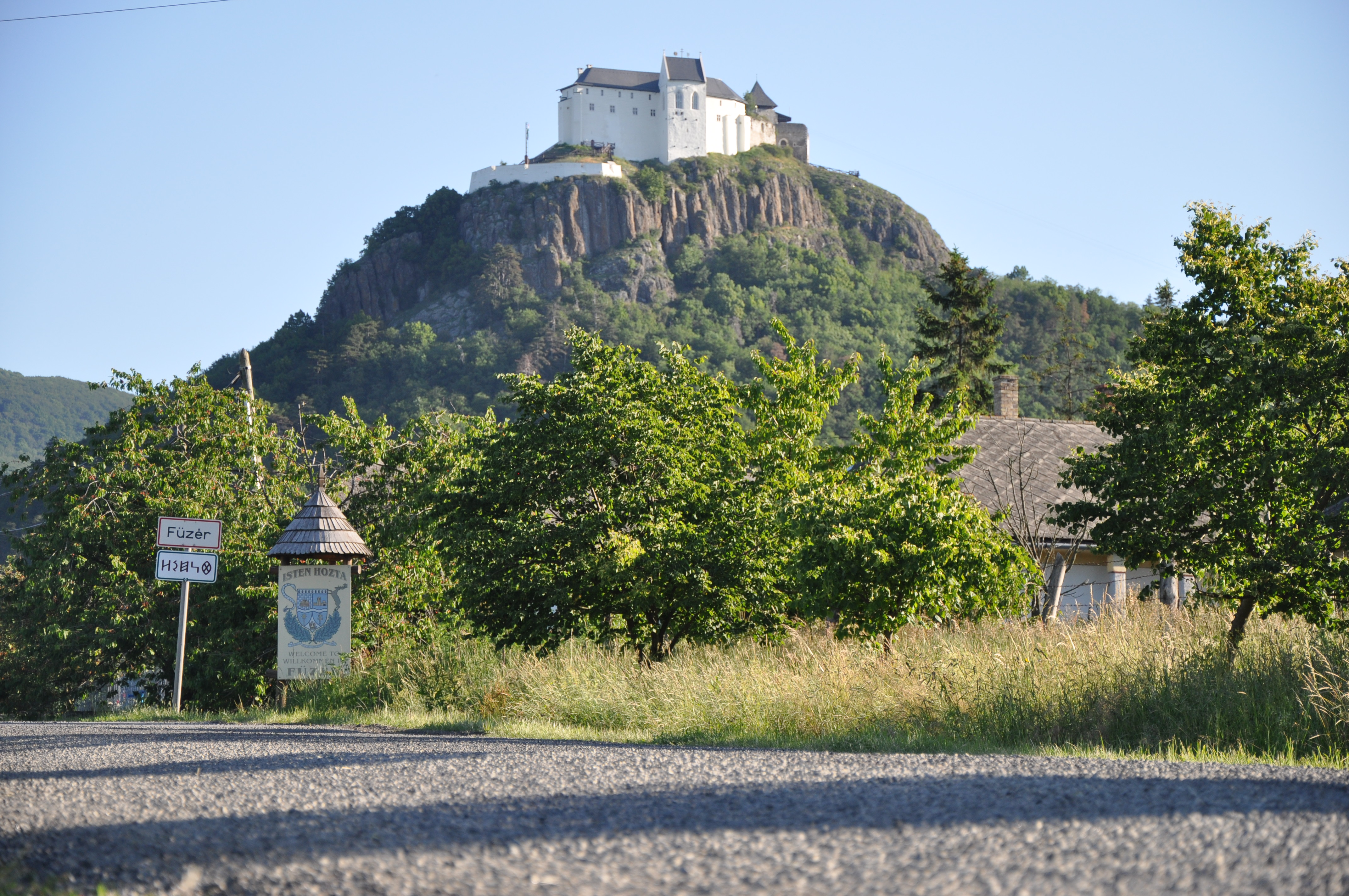 Az újjáépült Füzér vára a faluba érkezve